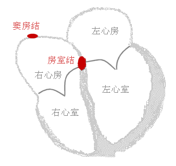 原图来自[Hypothetisches herz.jpg